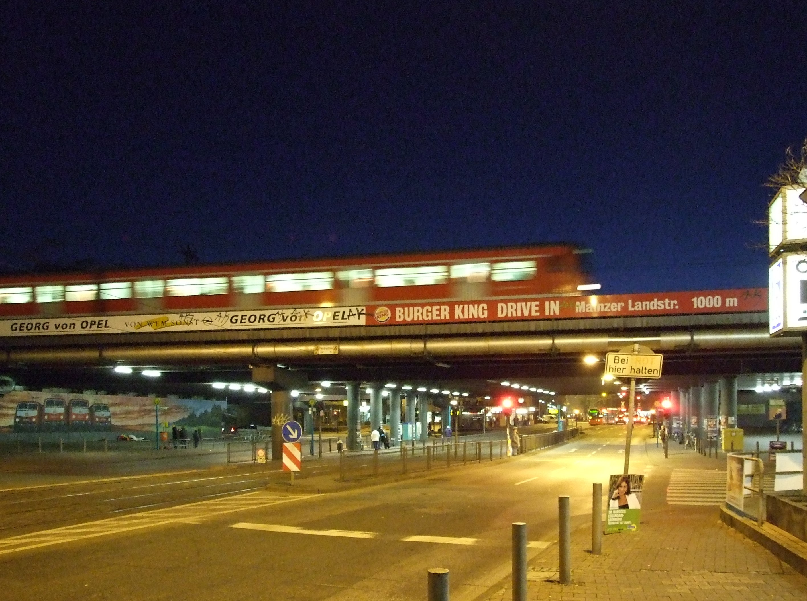 S-Bahn von Hauptbahnhof kommend, Einfahrt an Station Galluswarte in Ffm